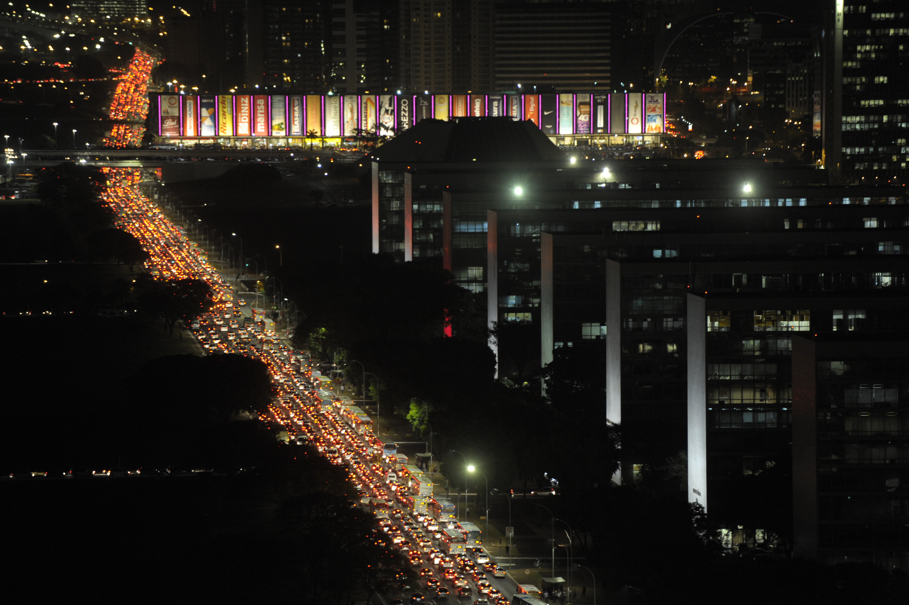 Trânsito na Esplanada dos Ministérios no sentido da Rodoviária de Brasília. Foto: Jefferson Rudy/Agência Senado